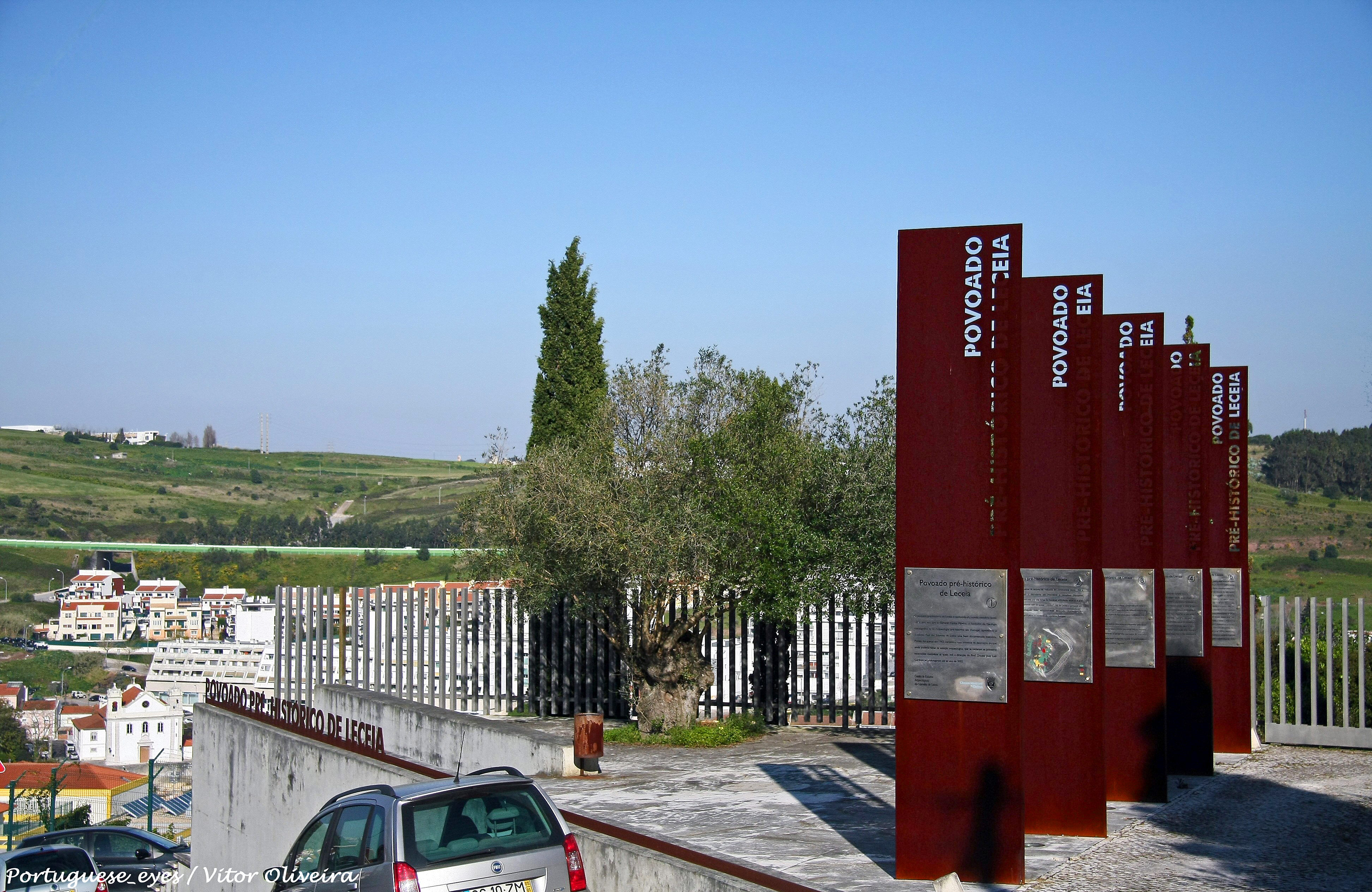 O Castro de Leceia, localizado na freguesia de Barcarena, concelho de Oeiras é uma das estações arqueológicas mais importantes de Portugal, tendo as escavações aqui realizadas revelado estruturas habitacionais e defensivas, assim como numerosos artefactos. O estabelecimento de um povoado em Leceia, logo no Neolítico Final, e a subsequente construção a partir do Calcolítico Inicial, indicam já o apreciável desenvolvimento de uma economia agro-pastoril, embora também fizesse a recolecção de mariscos na Ribeira de Barcarena, na altura um rio. Foi ocupado durante cerca de mil anos e data de 3 200—3 000 a.C.; vem desde o Neolítico final até ao período Calcolítico final (Idade do Cobre). Na Fábrica da Pólvora, também na freguesia de Barcarena, está exposta a maqueta deste povoado, assim como os objectos nele encontrados, o qual explica o dia a dia do Castro de Leceia, desde as suas estruturas habitacionais e organizacionais, aos seus cultos e ritos.